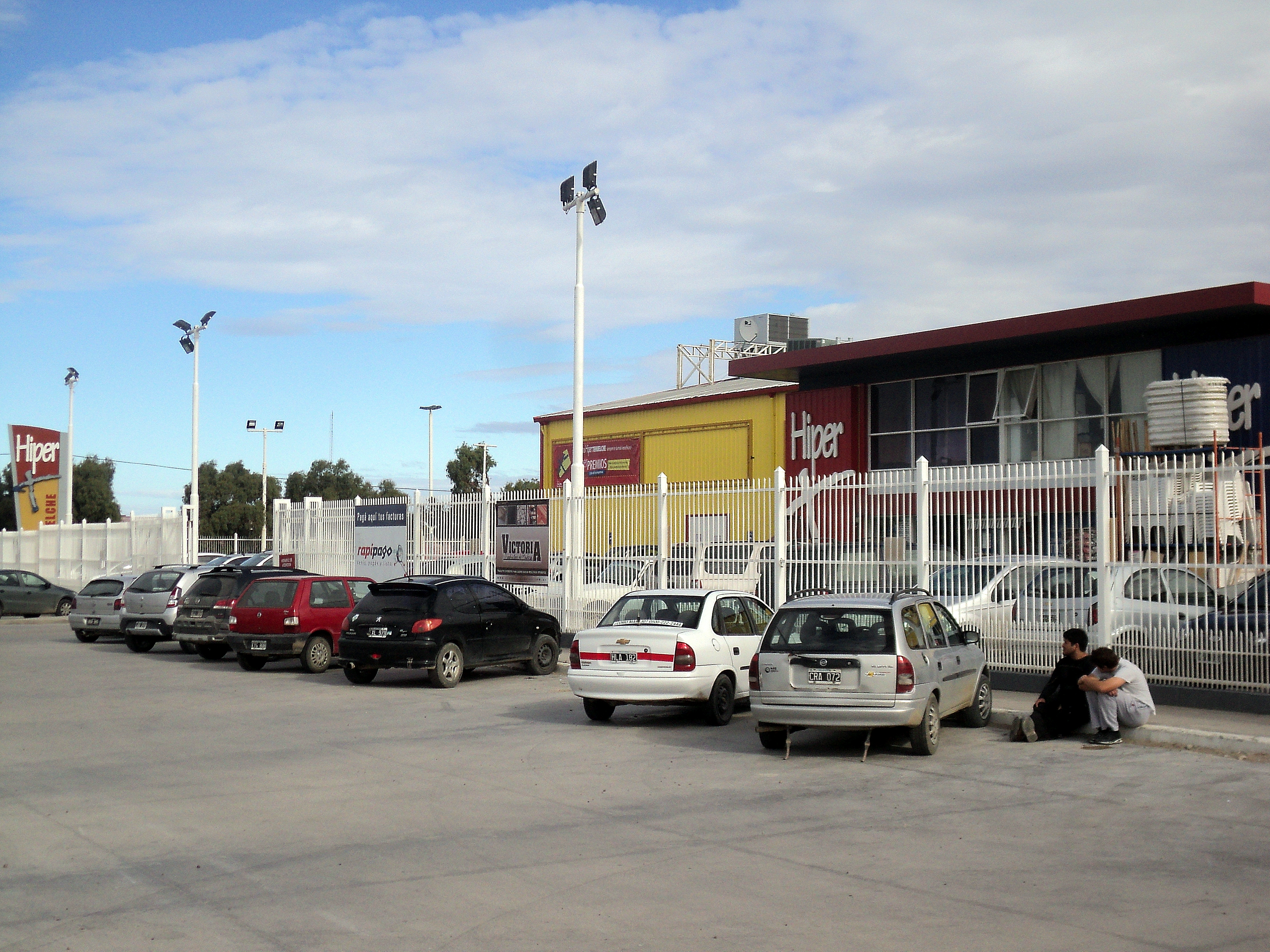 El Hiper Tehuelche en Km3, su sucursal más boreal en Comodoro Rivadavia